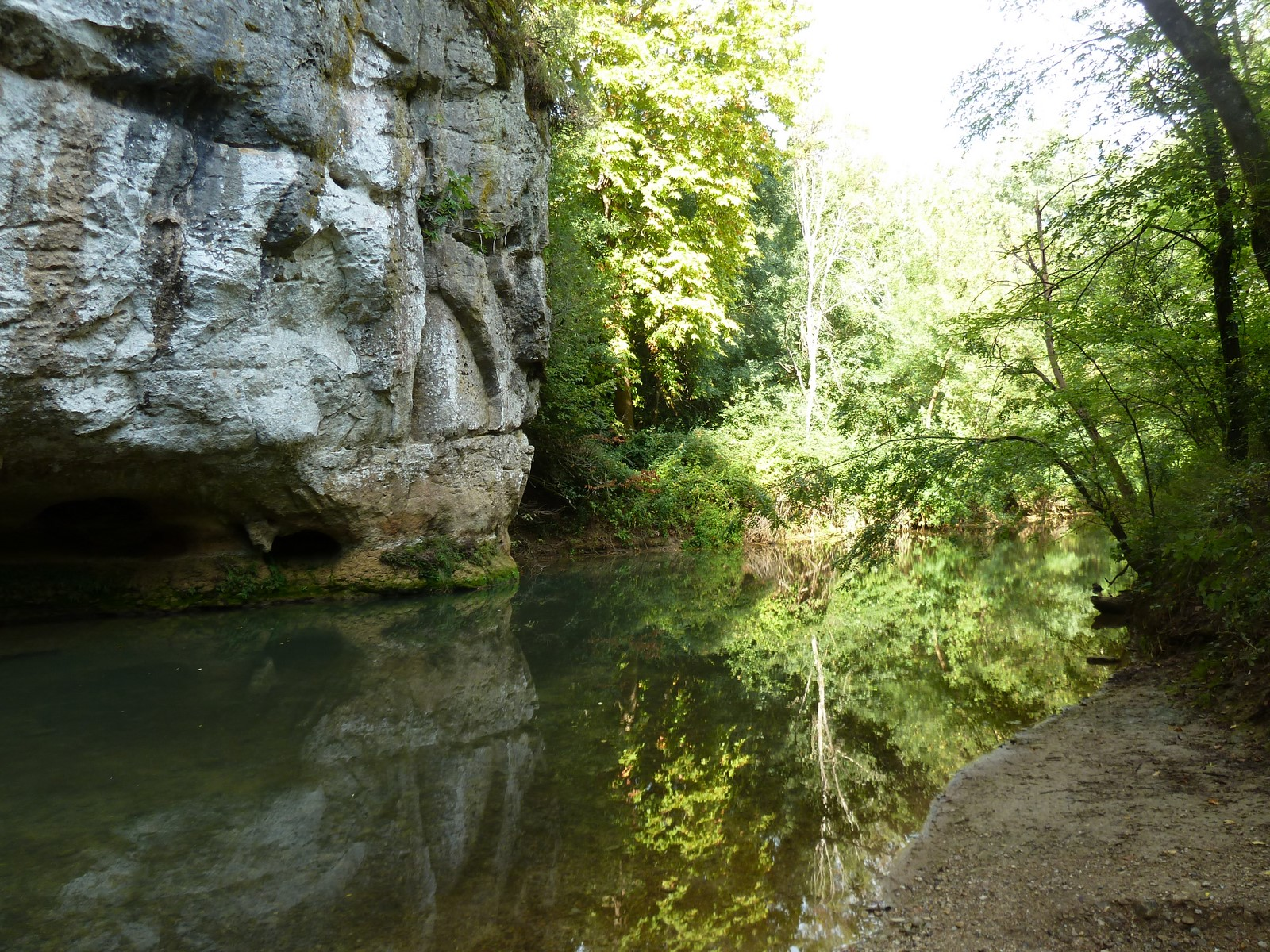 Le fleuve Argens au Vallon Sourne entre Correns et Châteauvert (Var) France